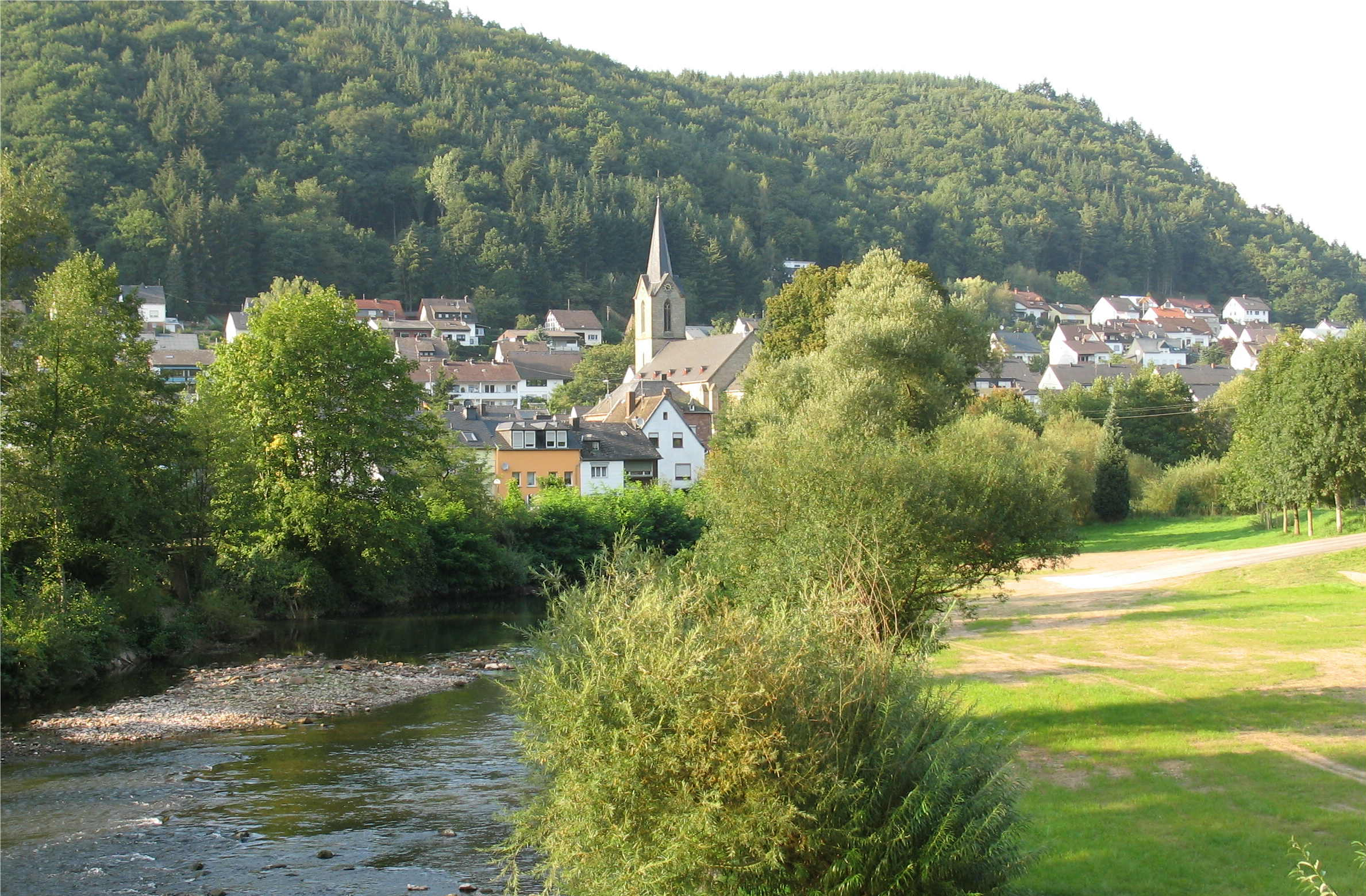 Kordel (Däitschland)